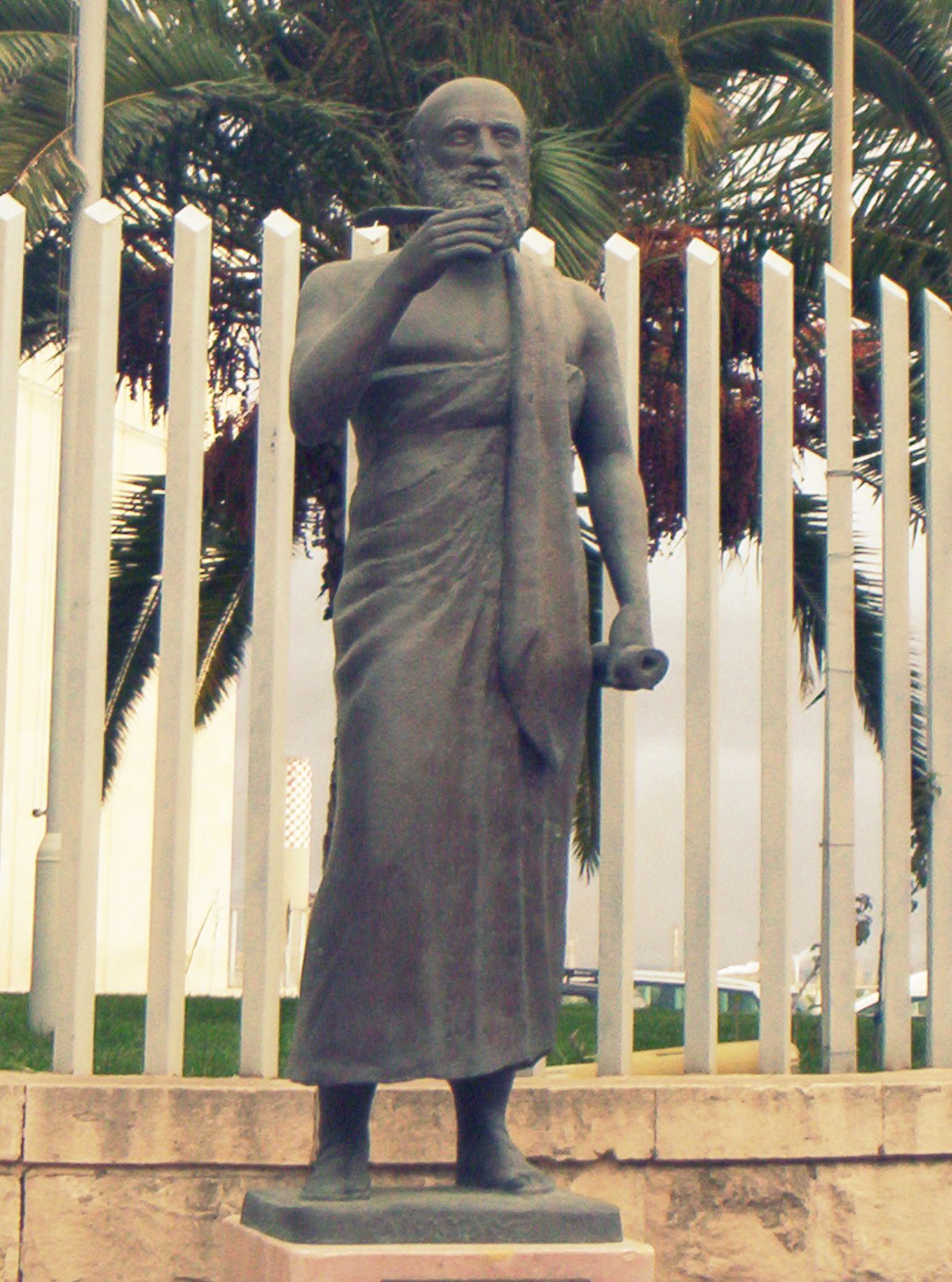 foto della statua di Eschilo, difronte all'ingresso del museo di Gela